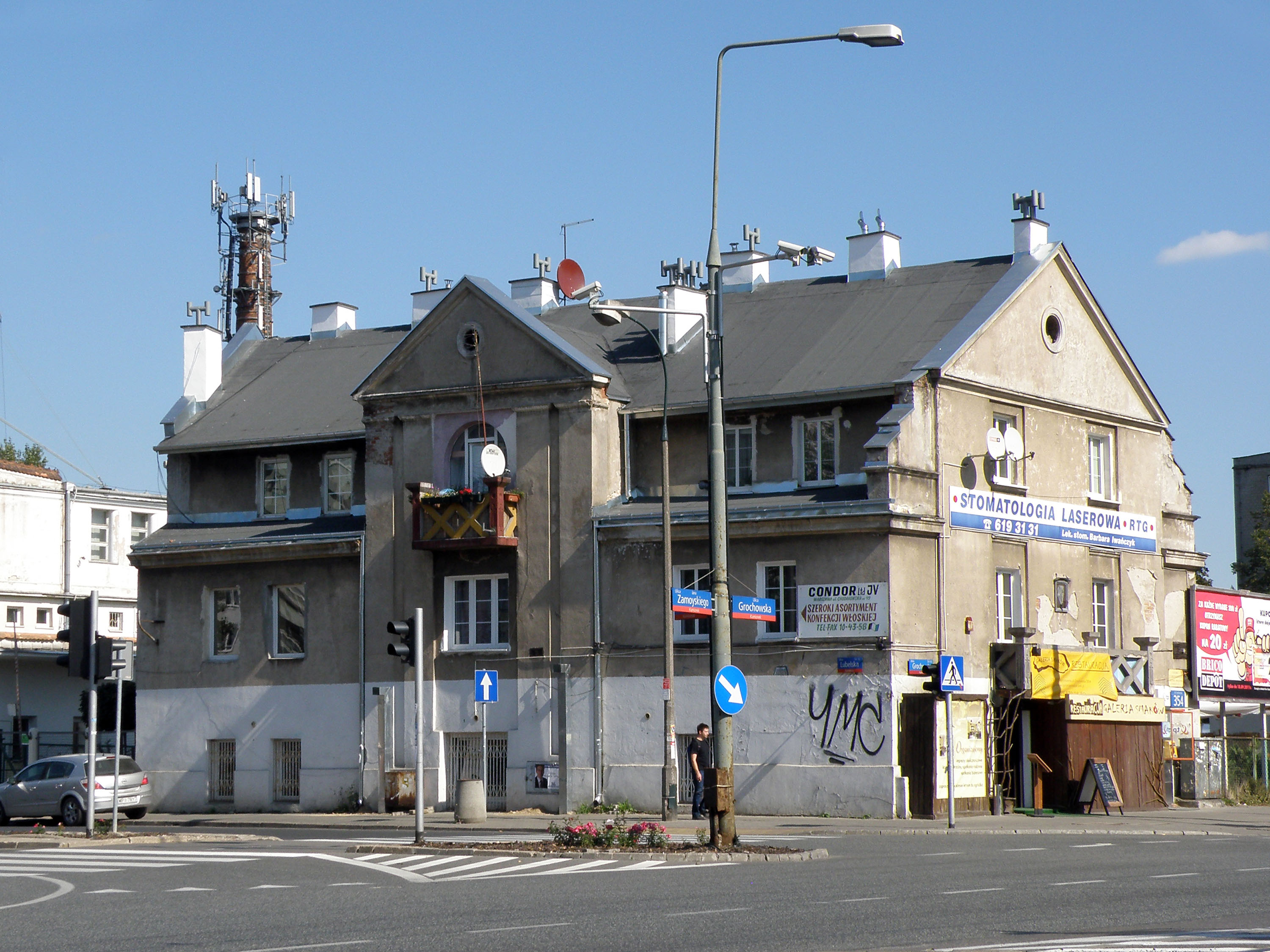 Fabryka gilz Dzwon Hilarego Jeżewskiego w Warszawie, Praga Południe.